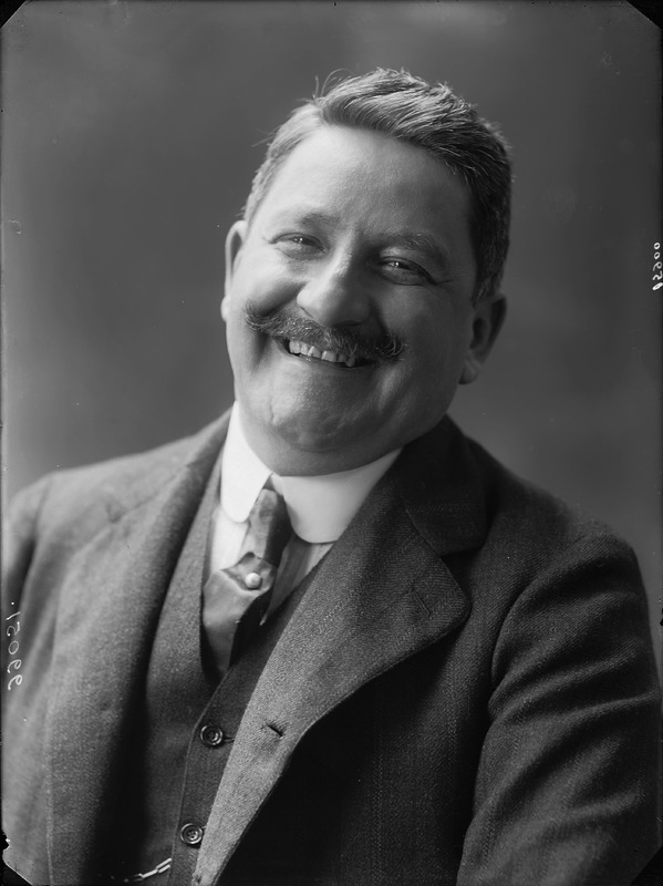 Carlo Montani, pittore e giornalista